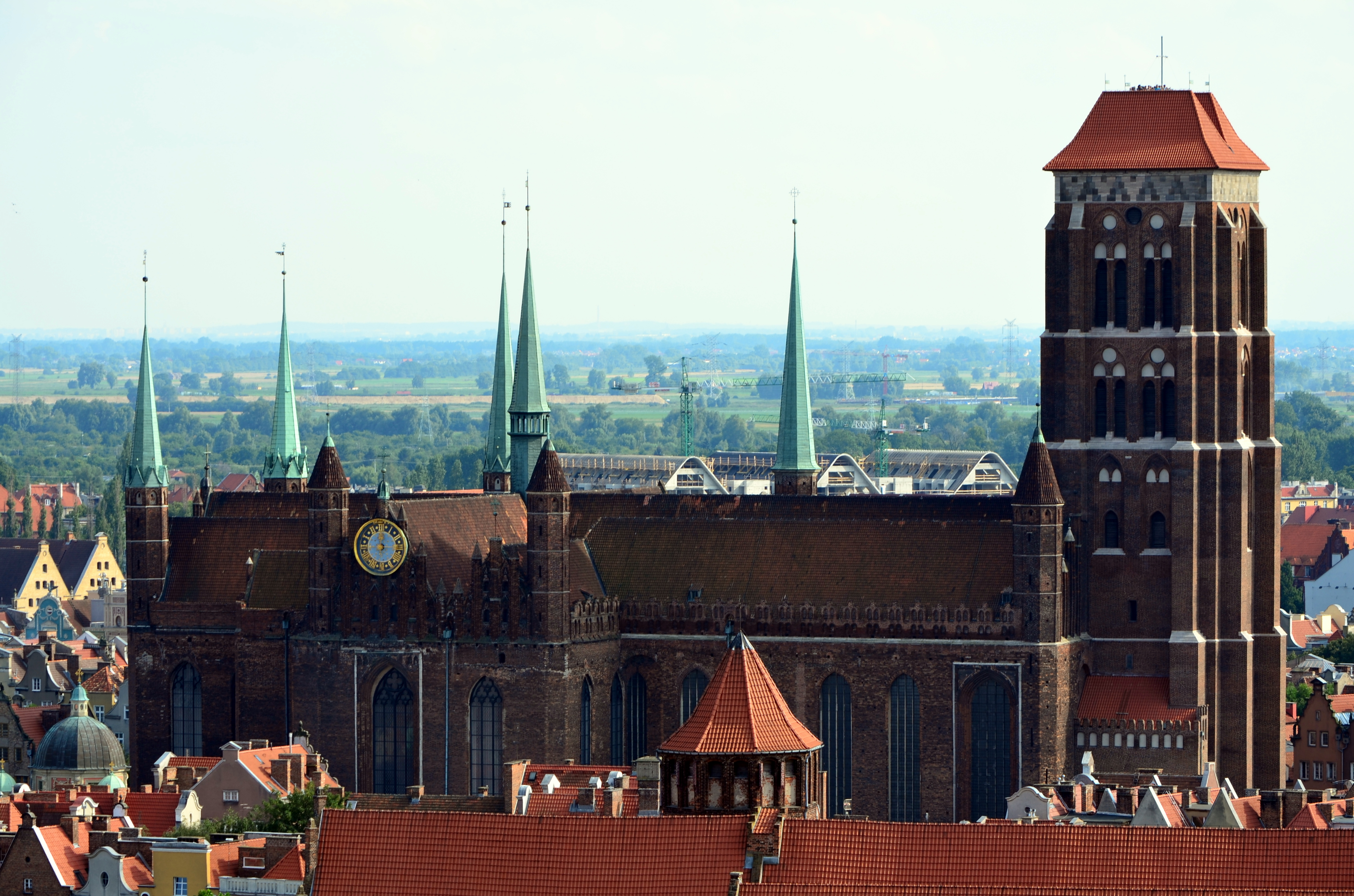 Danzig: Marienkirche im Profil.